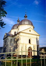 Церква у с. Червоне (Золочівський деканат). 1886 р., архітектор В. Нагірний (1848—1921)